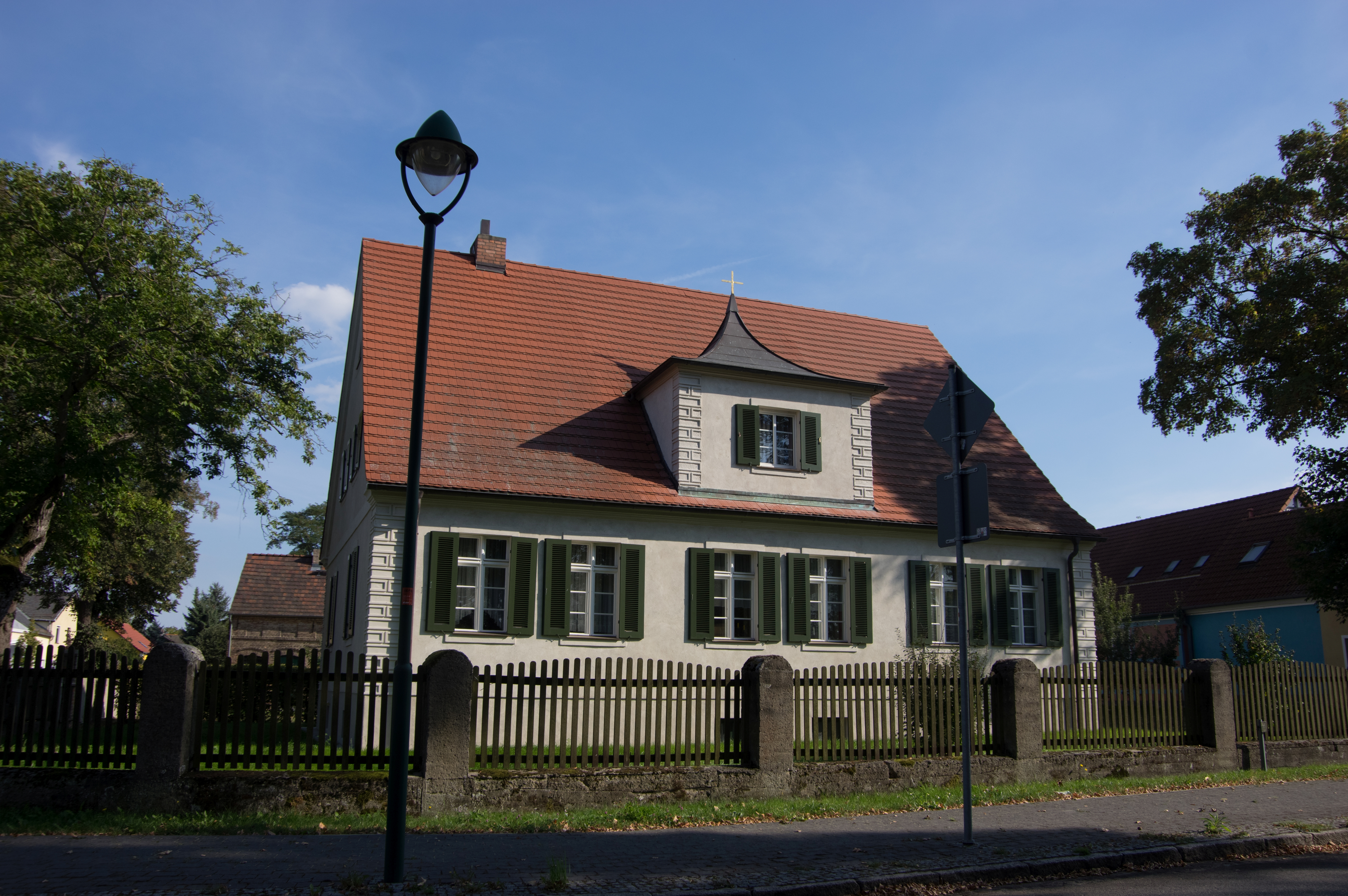 Trebbin, Ortsteil Christinendorf. Das Haus ist das Pfarrhaus der Gemeinde und liegt nordöstlich der Kiche auf der anderen Seite der Straße. Es ist denkmalgeschützt.